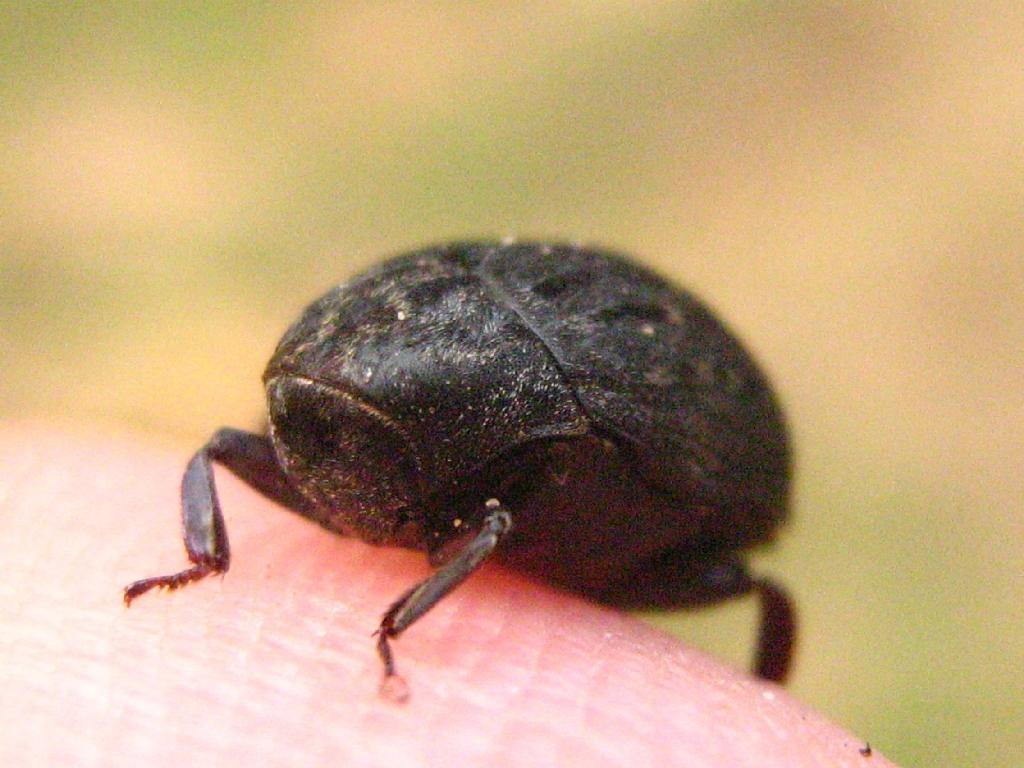 Der Pillenkäfer Byrrhus pilula, gefunden im Nauener Stadtwald (Brandenburg